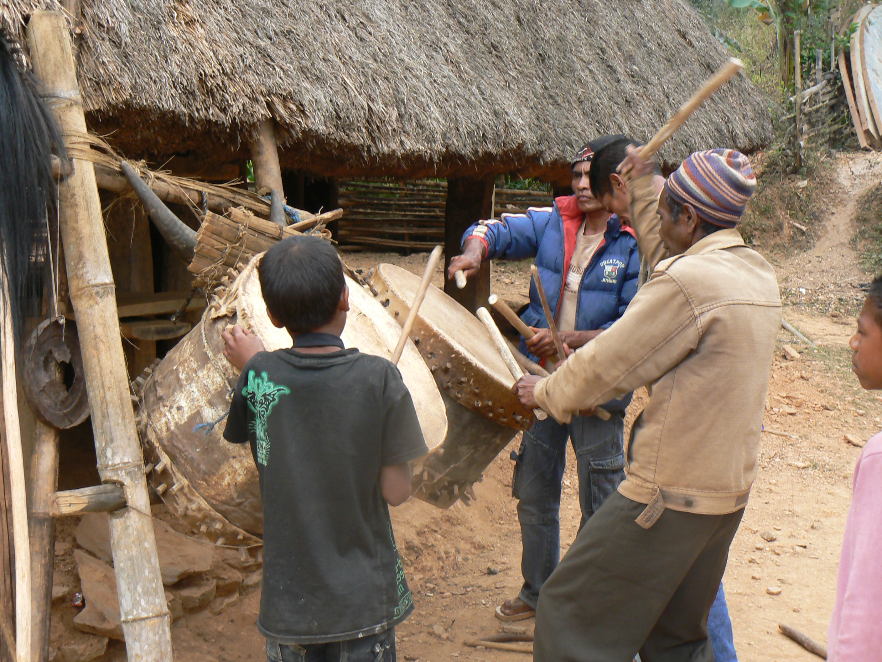 Uma Lulik in Estado